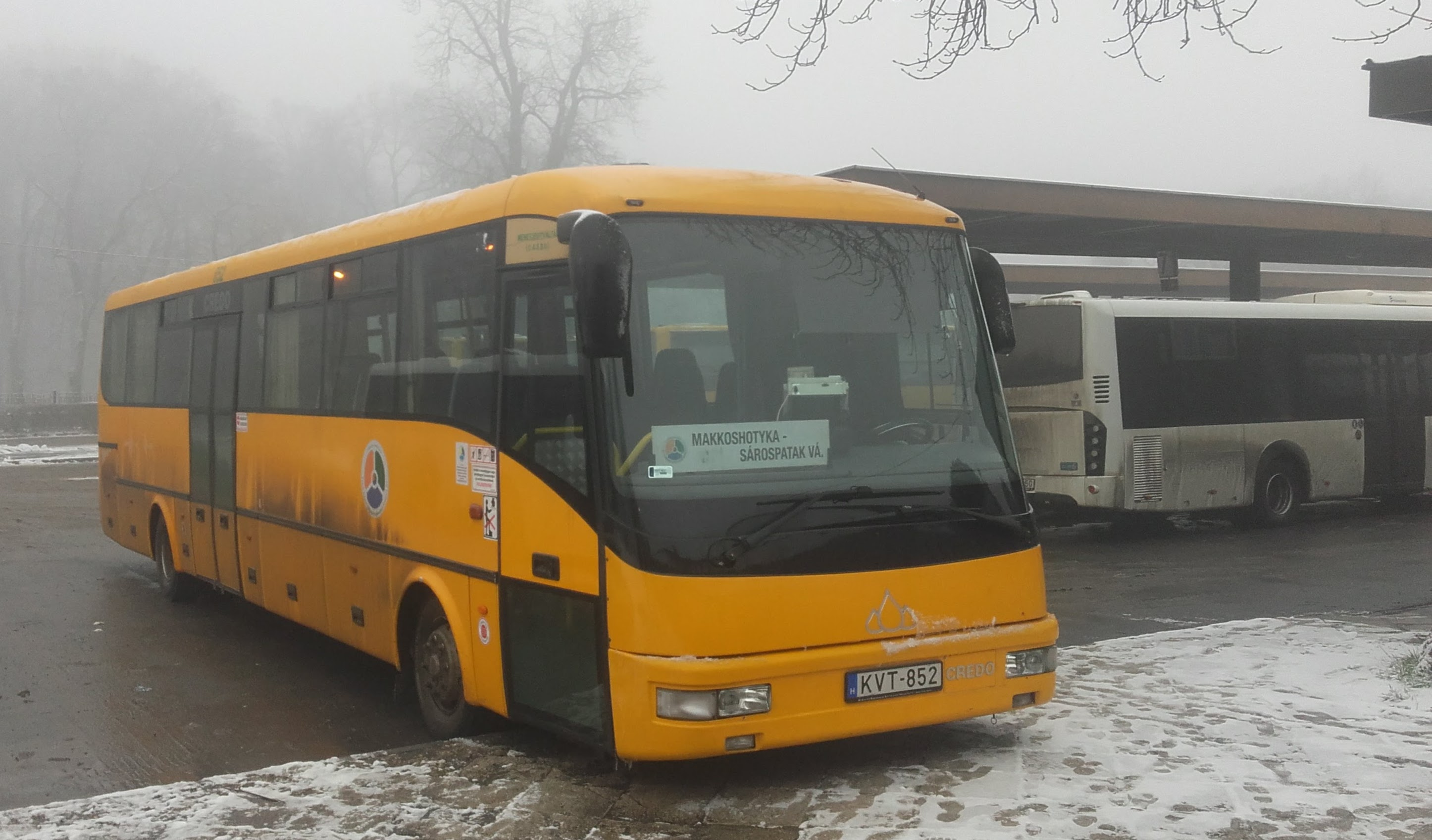 Az ÉMKK KVT-852 rendszámú Credo EC 12 típusú busza Sárospatakon, a 3886-os helyközi járaton.